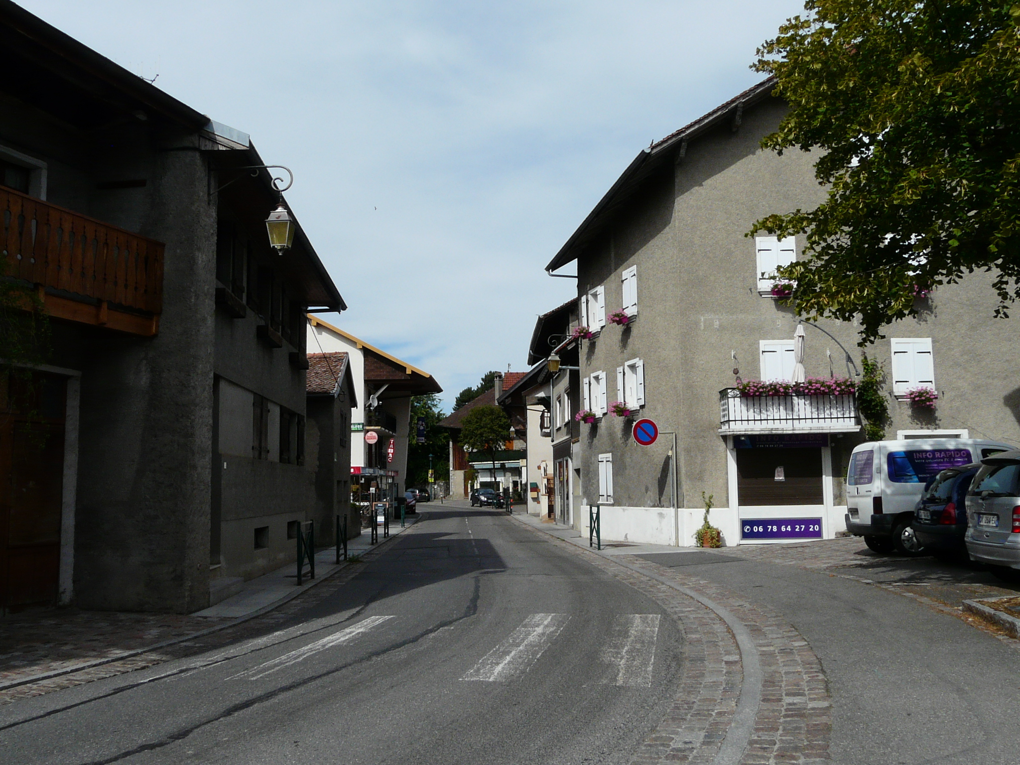 Champanges (Haute-Savoie) : la rue des Alpes